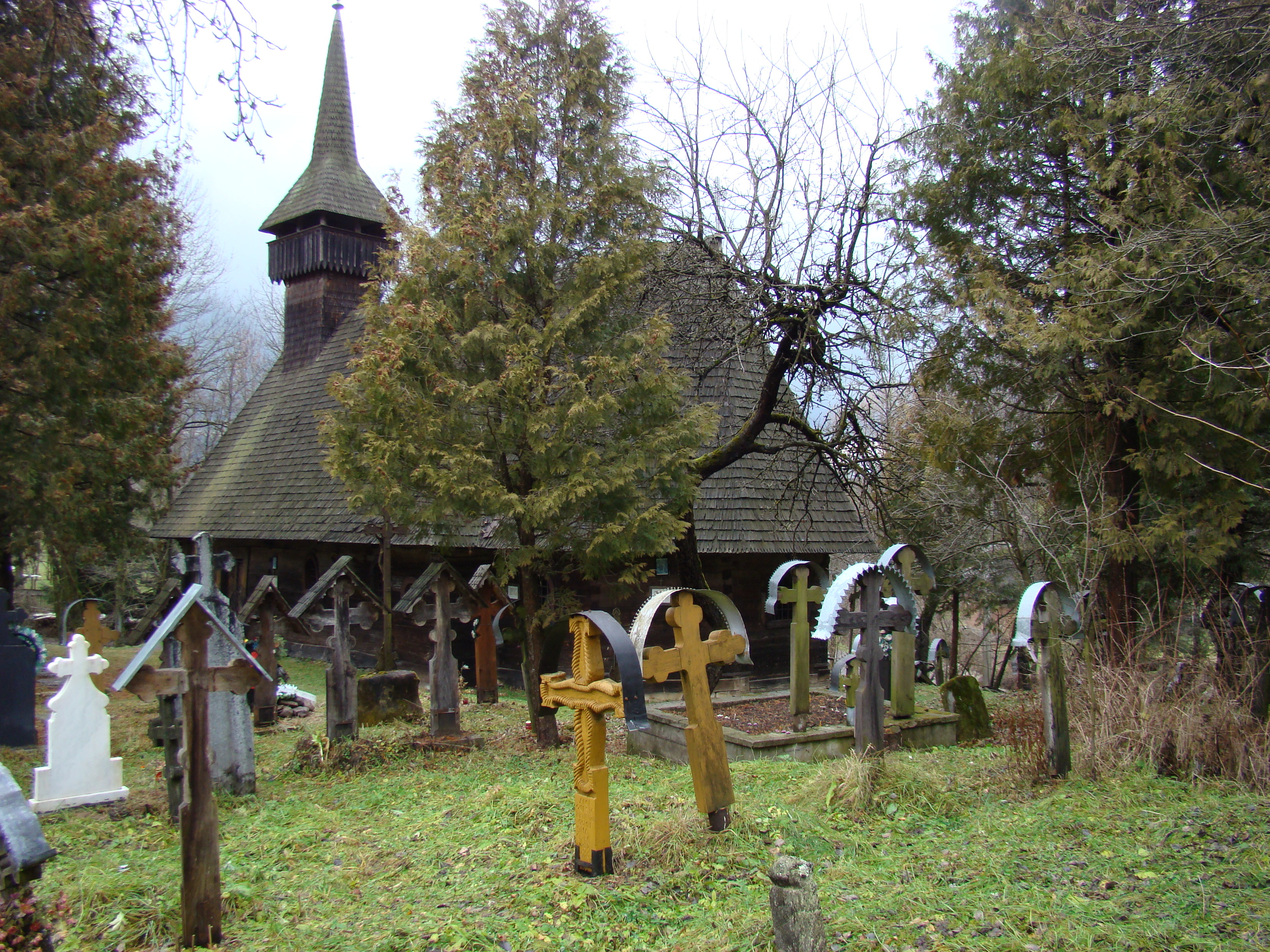 Biserica de lemn din Breb, județul Maramureș 01